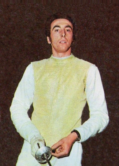 CAMPIONI dello SPORT 1973/74-Figurina n.327- NOEL - FRANCIA -SCHERMA